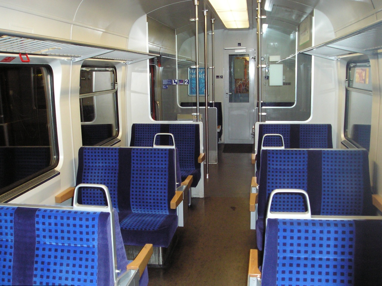 Modernisierte Inneneinrichtung im DB-Medien-Design in einem Bxf 796.1 am 13.10.06